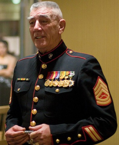 Lee-Erney Gunny